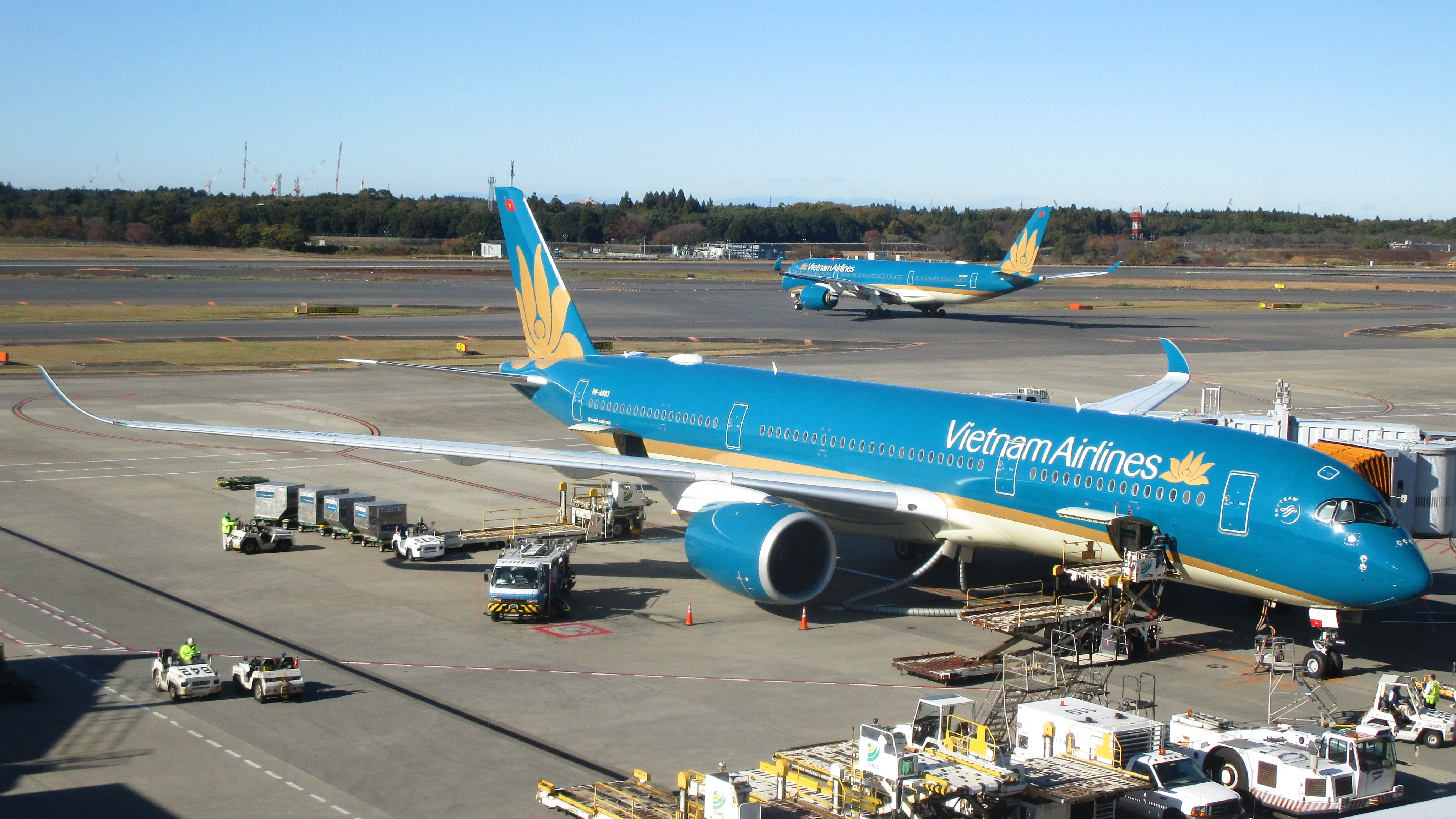 成田国際空港で撮影された2機のエアバスA350（ベトナム航空）